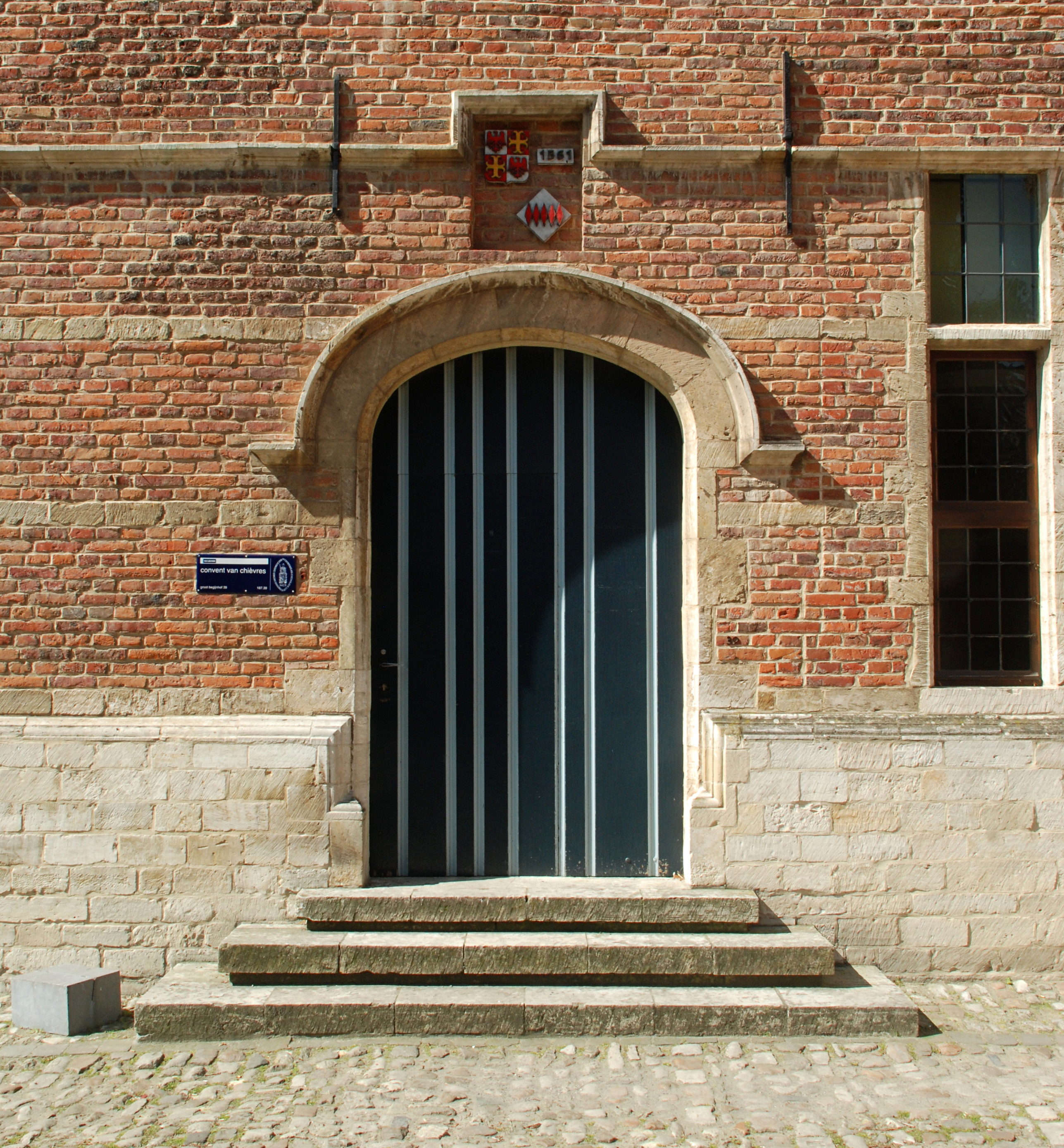 Belgium - Leuven - Groot Begijnhof - Convent van Chièvres - Benedenstraat 39